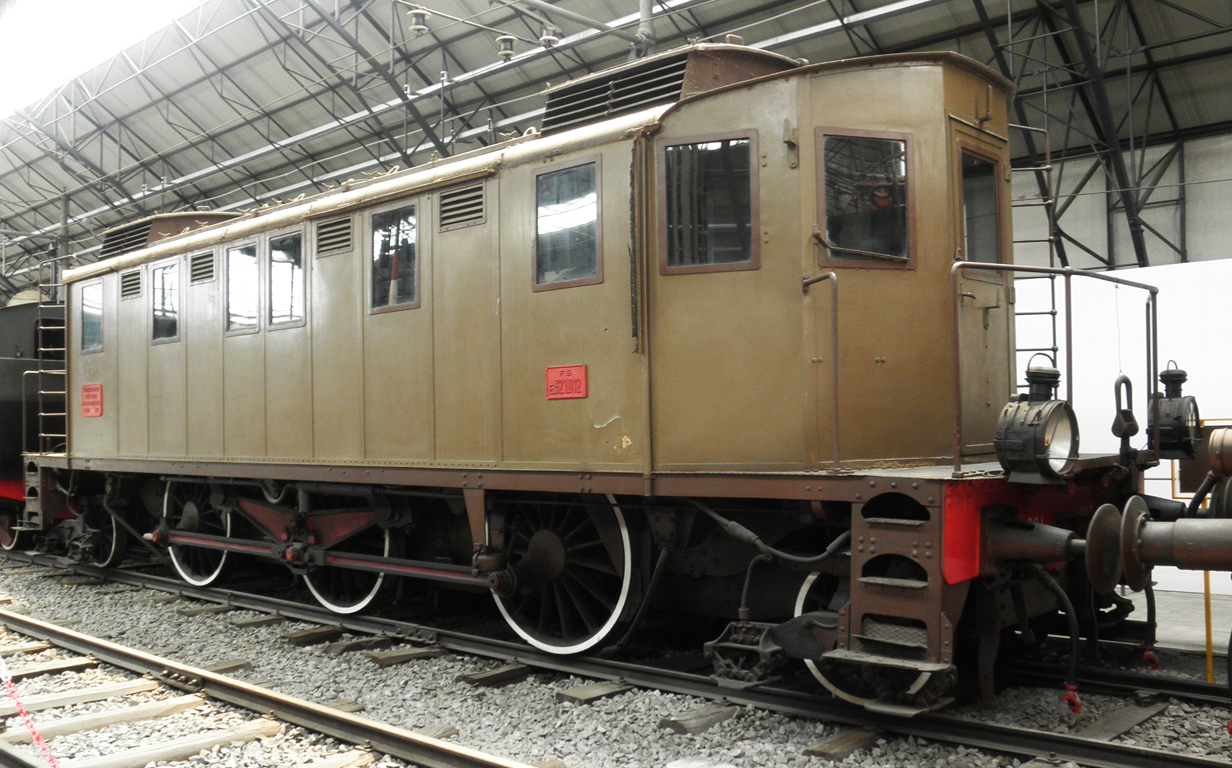 Locomotiva elettrica E.321 al Museo della Scienza e della Tecnologia di Milano